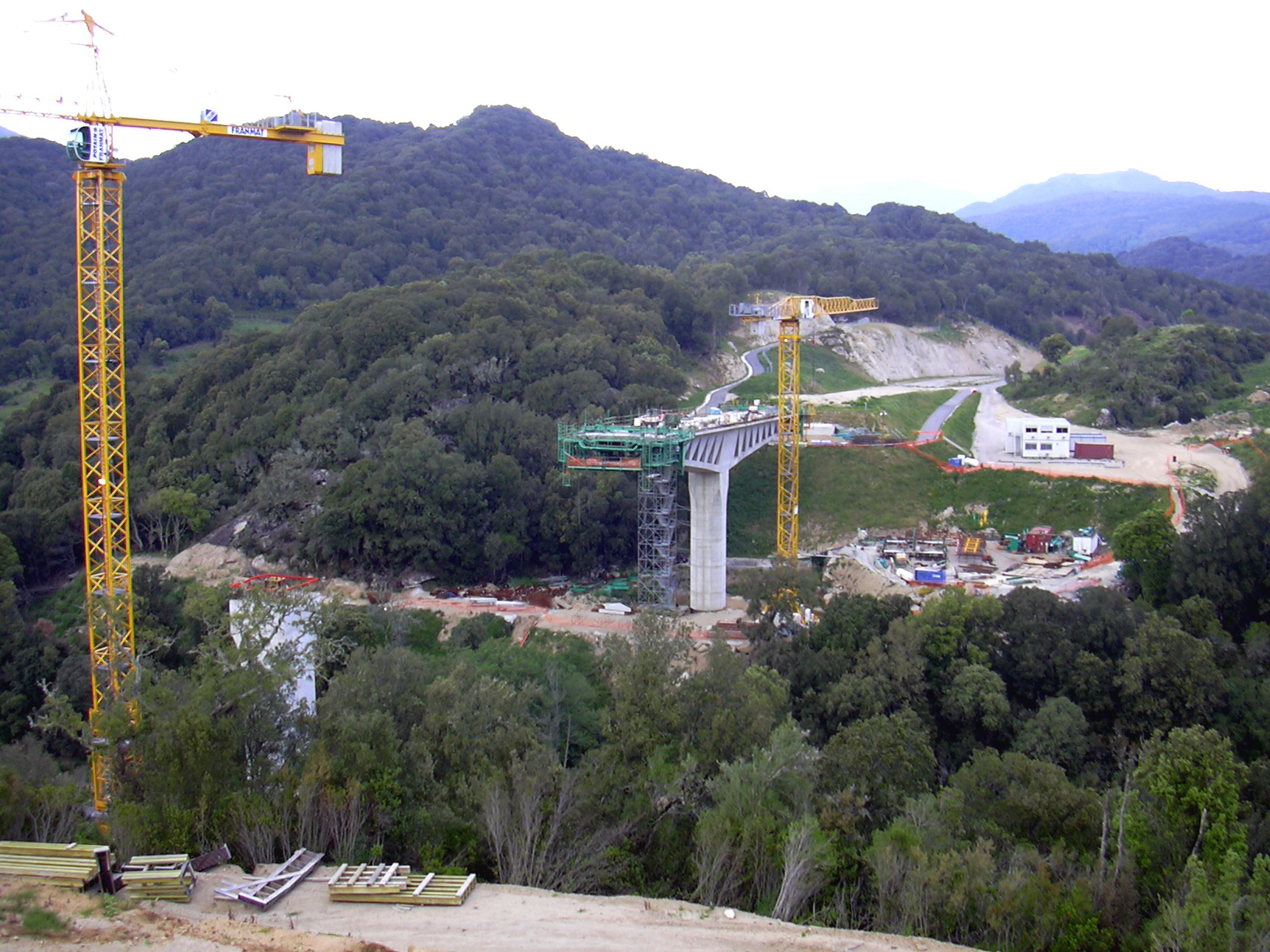 Pont en construction pour éviter une courbe de la Route Nationale N 196, entre Ajaccio et Petreto-Bicchisano (Corse-du-Sud, France)